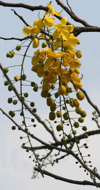 Amaltas - Indian Laburnum Cassia fistula in Kolkata, West Bengal, India.